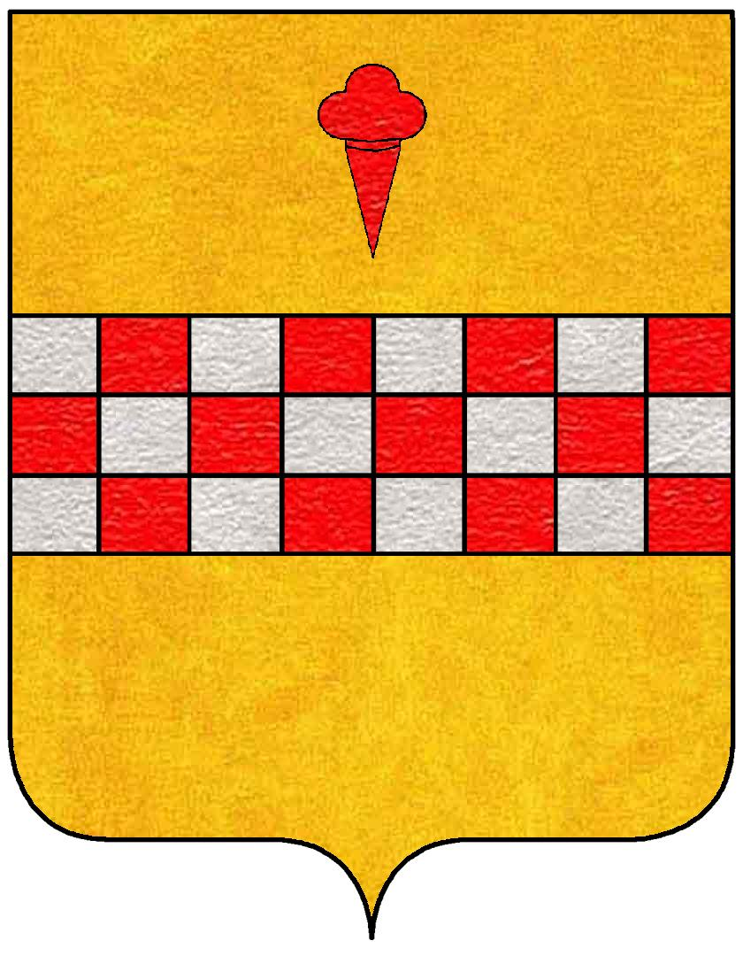 Stemma della famiglia Spinola